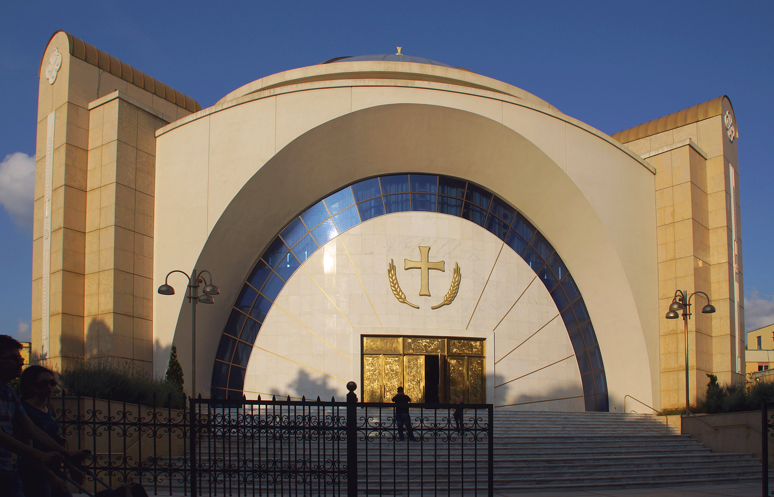 Albanisch-Orthodoxe Auferstehungskathedrale in Tirana. Die "Katedralja Orthodhokse Ngjallja e Krishtit" gehört zu den neueren Sakralbauten in Albanien. Die Kathedrale wurde 2012 eröffnet und 2014 geweiht. Foto 2014 Wolfgang Pehlemann DSC005851